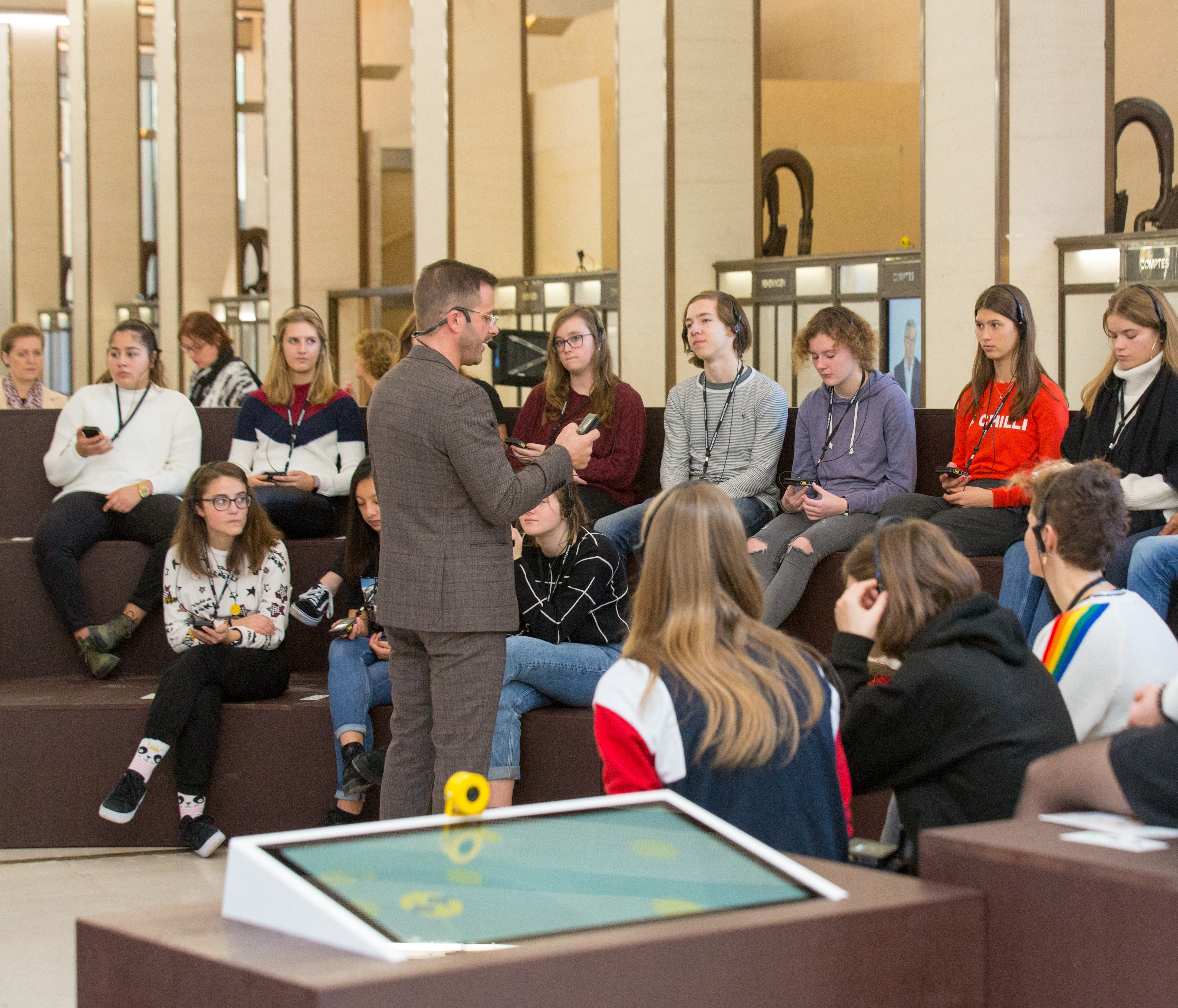 Hier zien we een groep jongeren die het Stellingspel speelt.